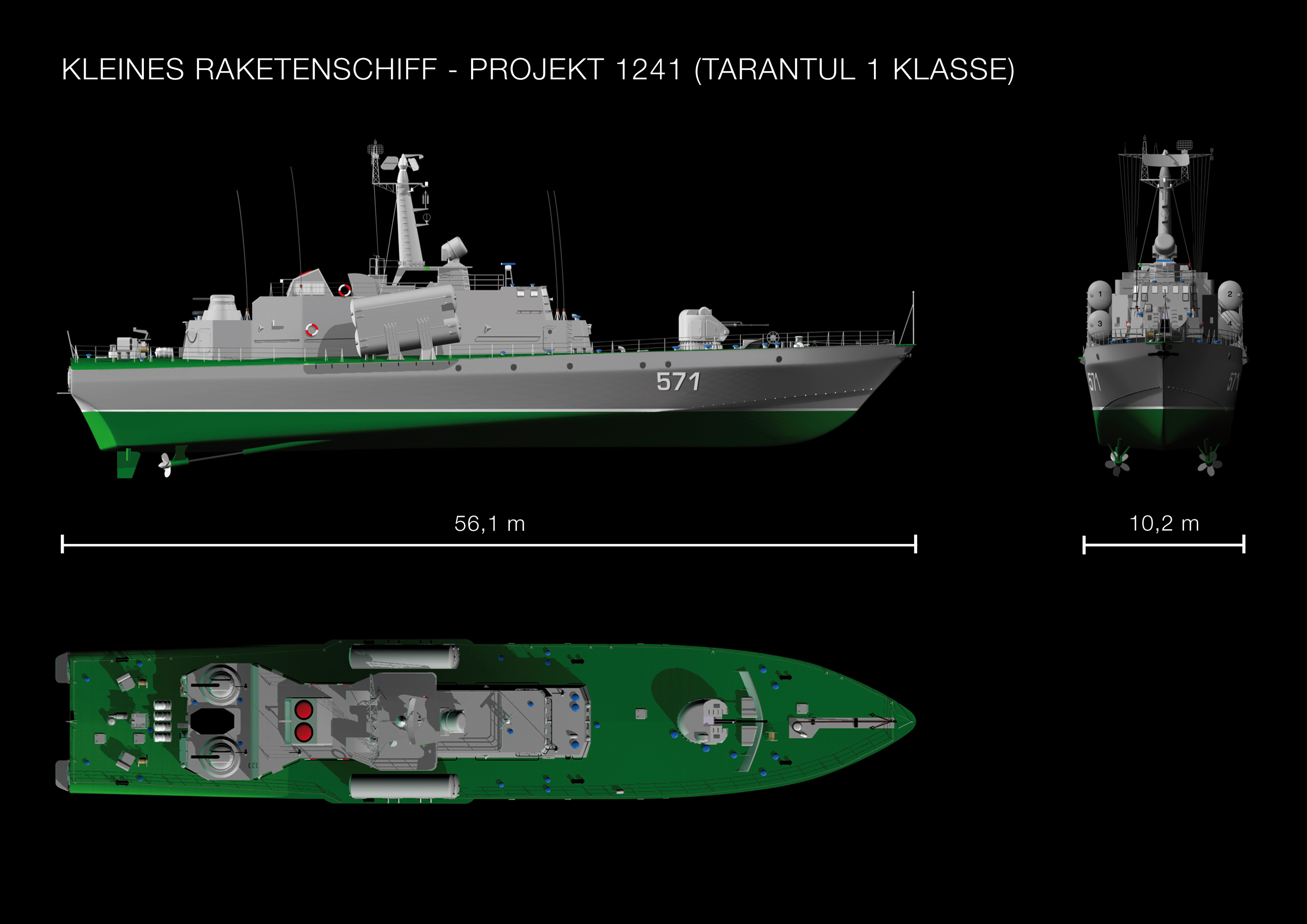 Dreistenansicht einer Raketenkorvete des Typs Projekt 1241 RE (Tarantu 1 Klasse)